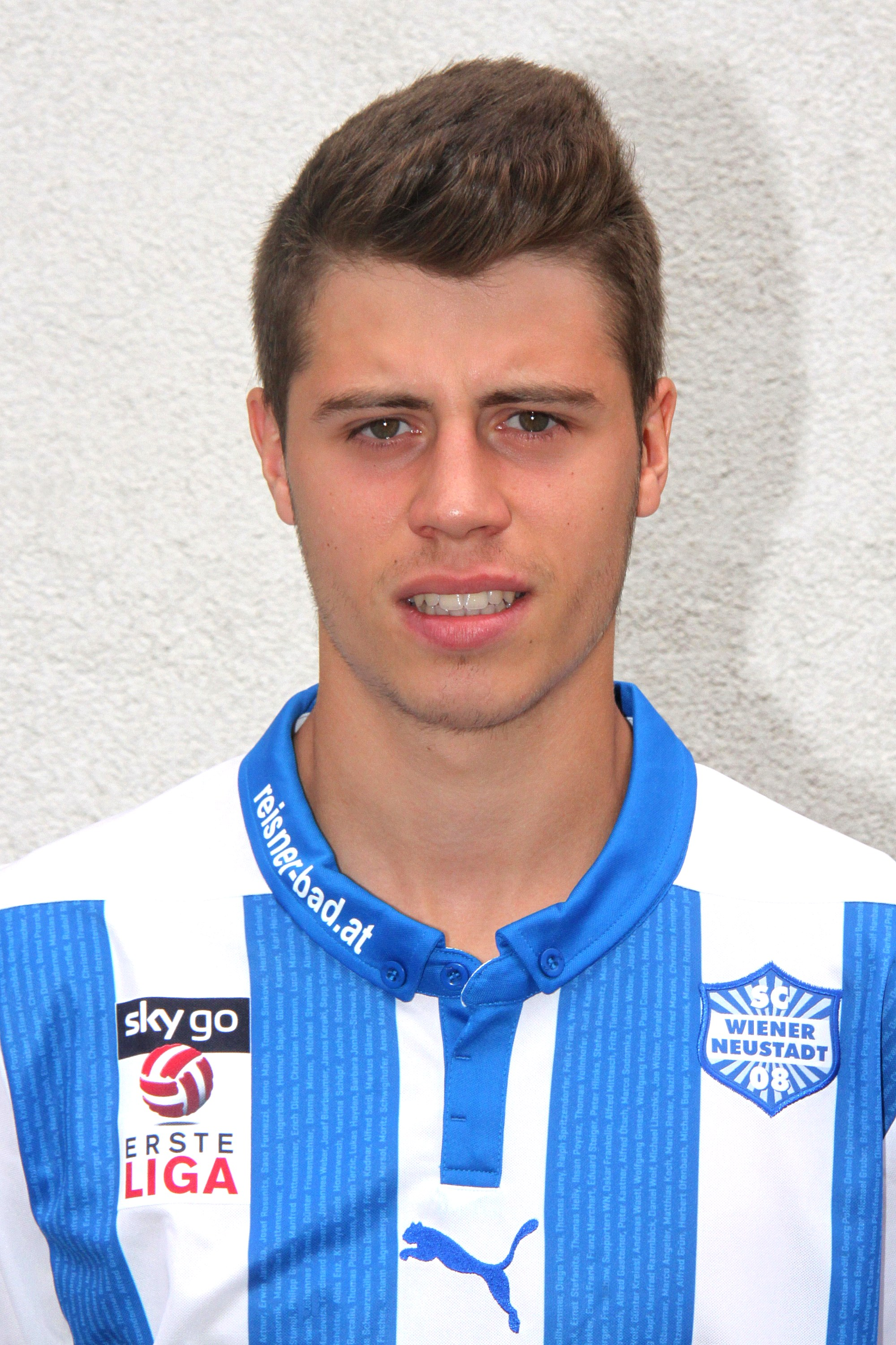 Mario Stefel, SC Wiener Neustadt 2015-2016